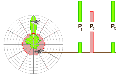 Verfahren der Nebenkeulenunterdrückung auf dem Abfrageweg bei einem Sekundärradar